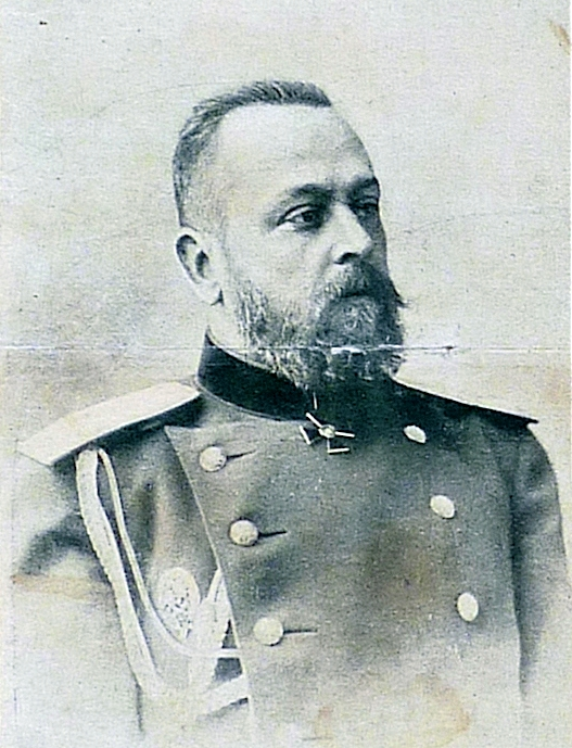 Самсонов, Александр Васильевич